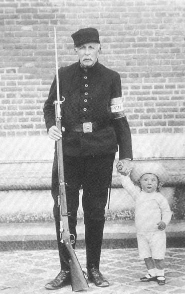 El príncipe Pedro con su abuelo Gastón de Orleans, Conde de Eu (durante la Primera Guerra Mundial).